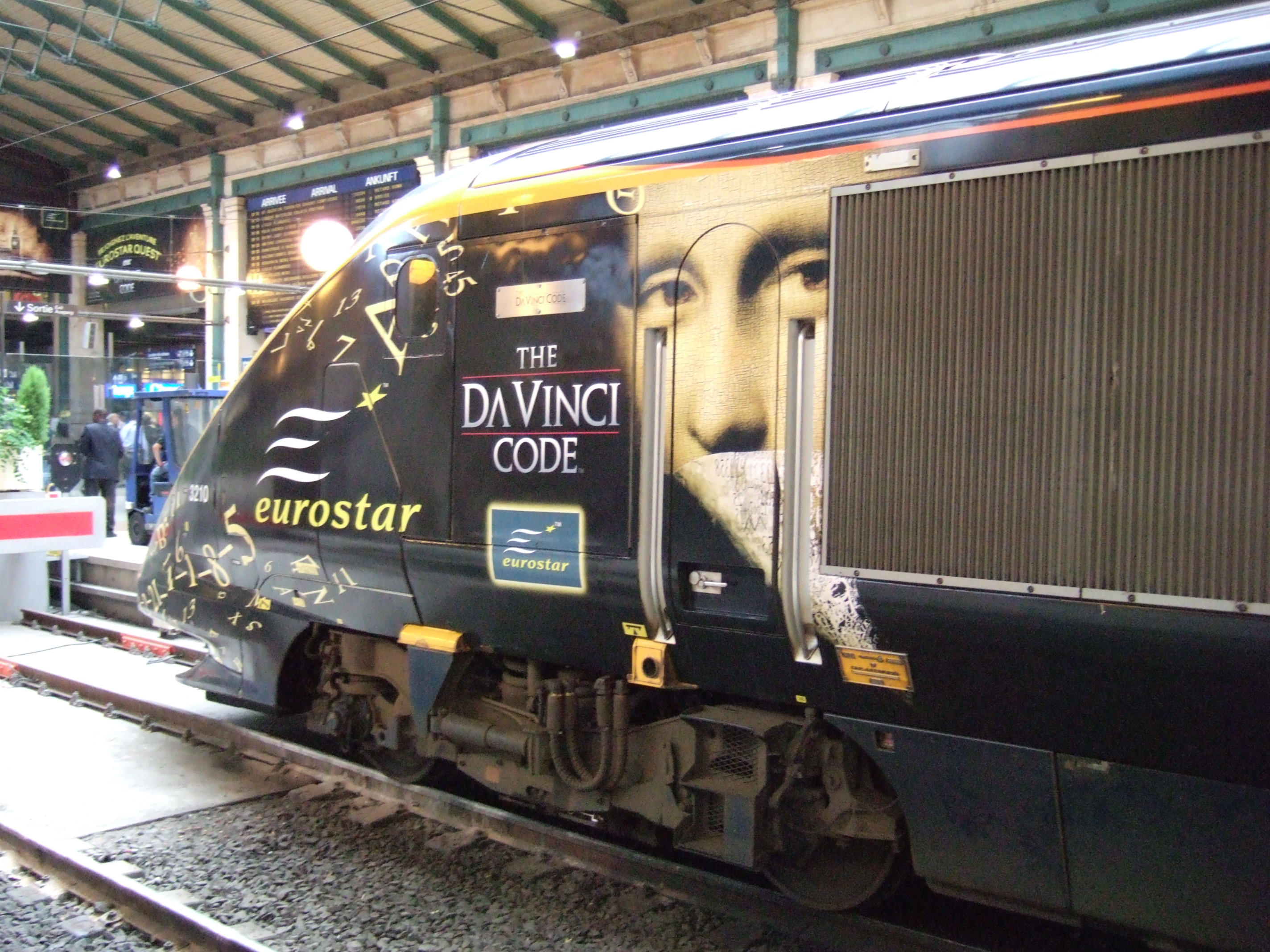 Taken in Paris Nord